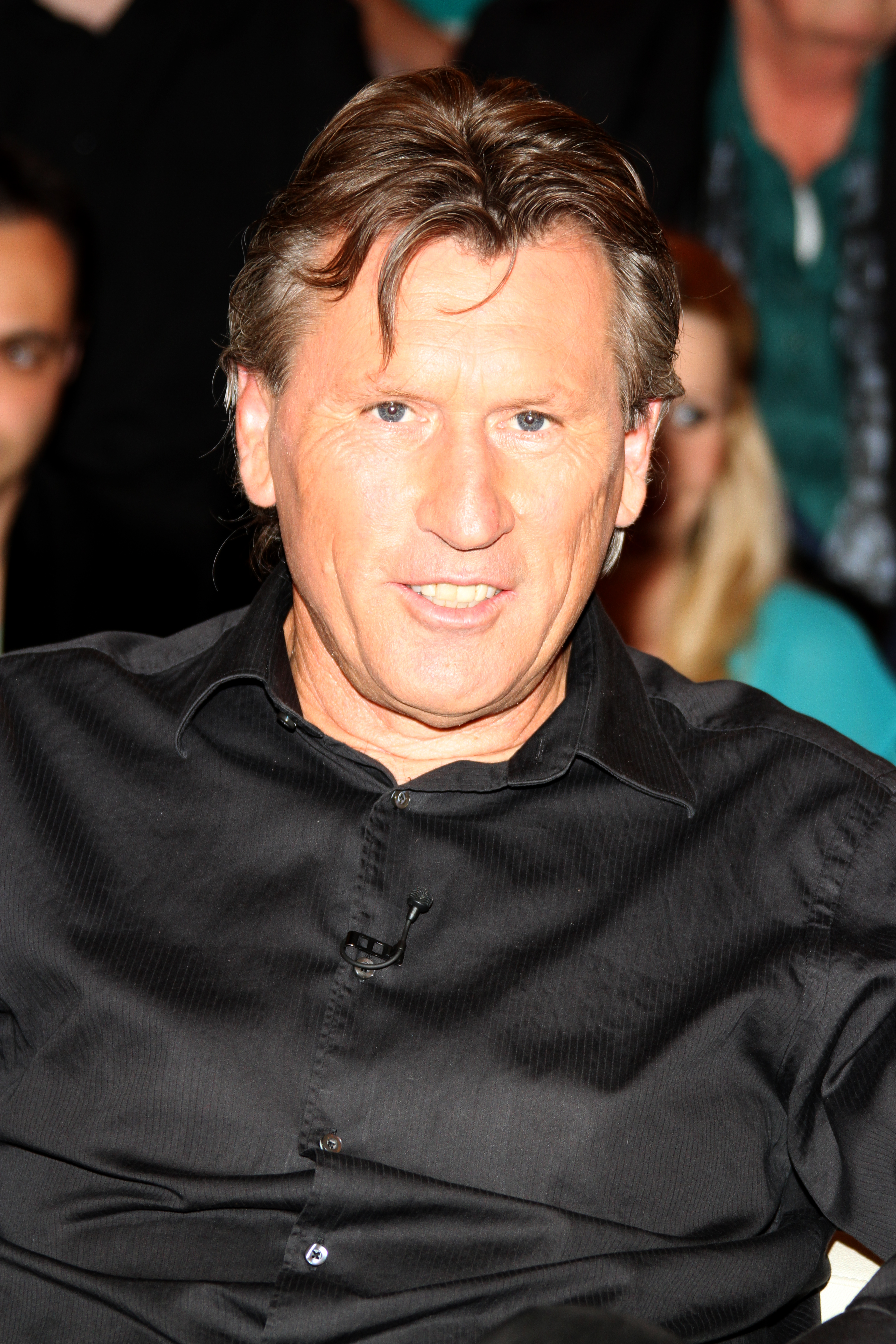 Manfred Kaltz (* 6. Januar 1953 in Ludwigshafen am Rhein) ist ein ehemaliger deutscher Fußballspieler.